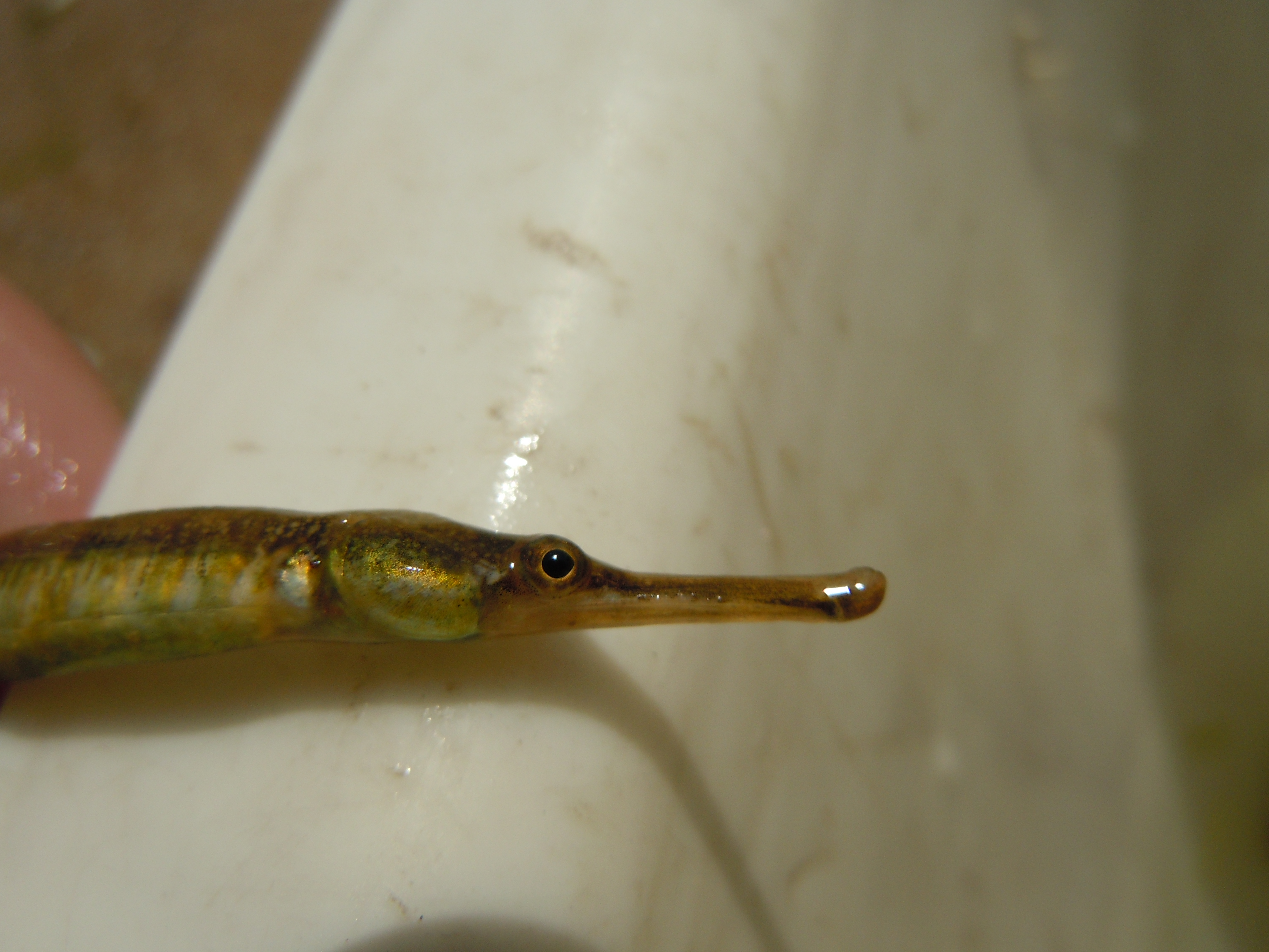 Голова іглиці тонкорилої (Syngnathus tenuirostris) з Григорівського лиману